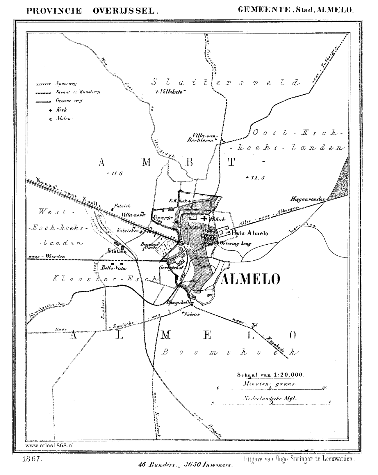 Kaart van Almelo uit Gemeente Atlas van Nederland, J. Kuyper 1865-1870, Uitgave Hugo Suringar Leeuwarden.